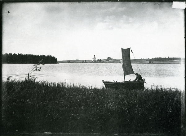 Озеро Вселуг. Широковский погост